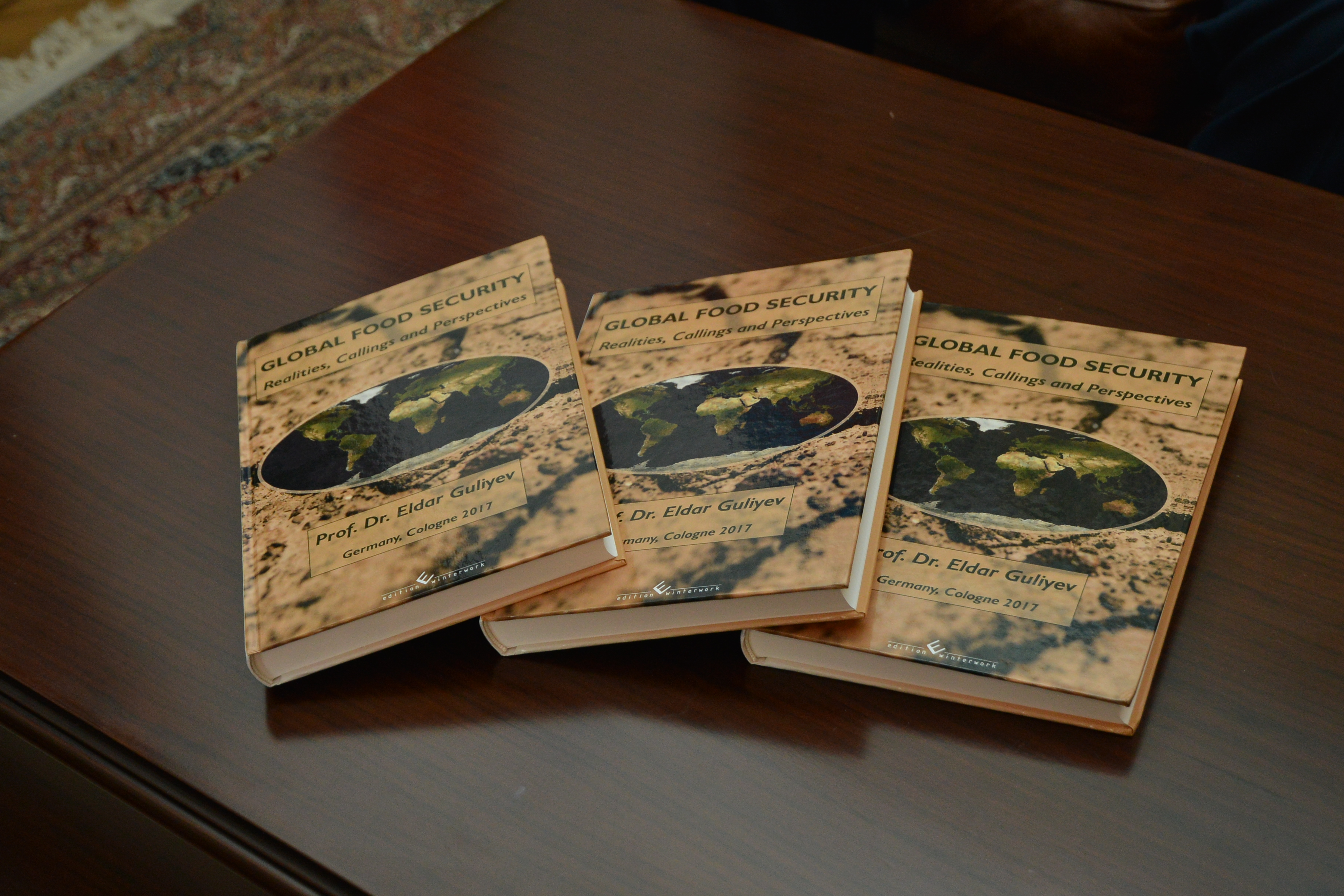 Eldar Quliyev sekil1